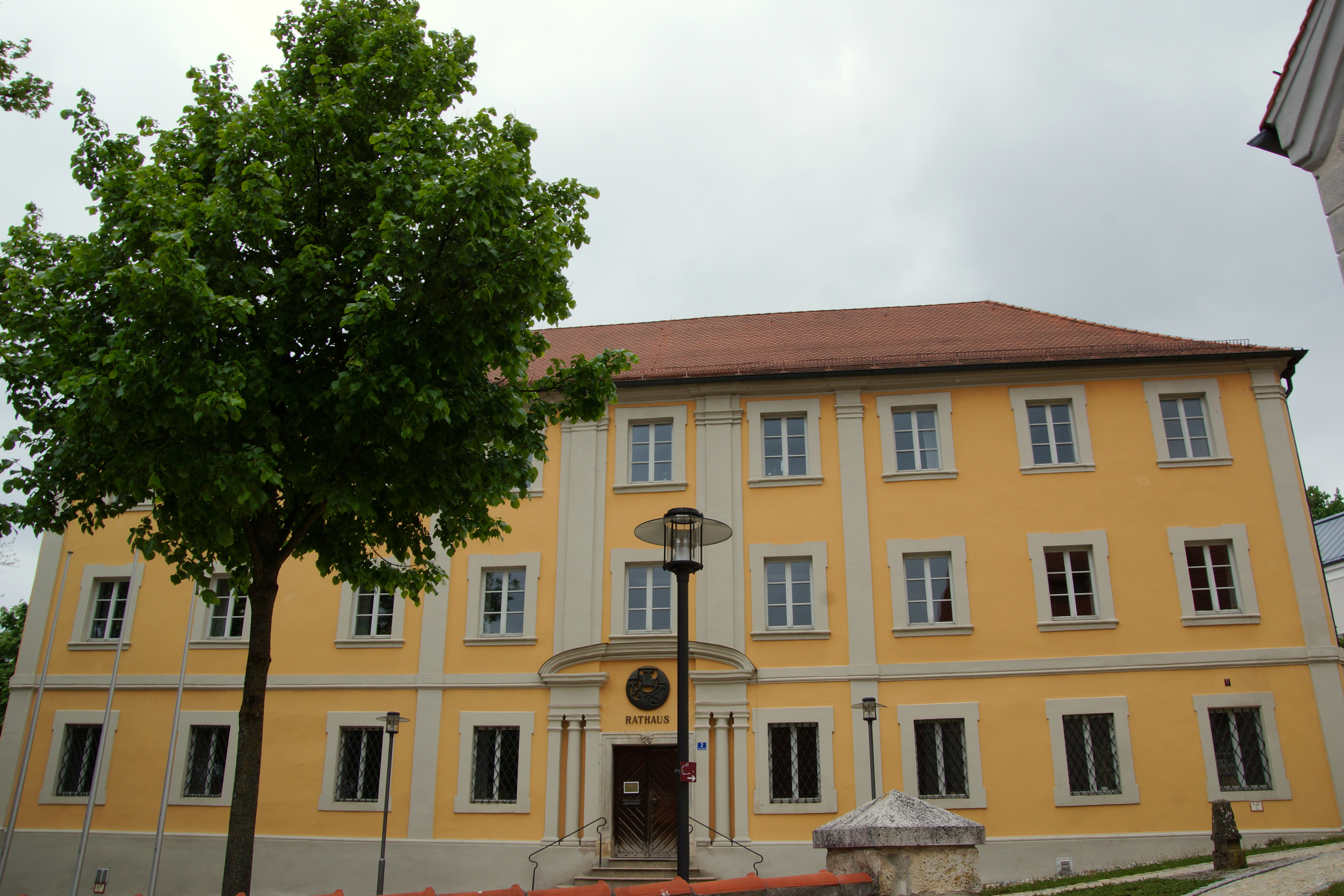 Stadt Hemau in der Oberpfalz